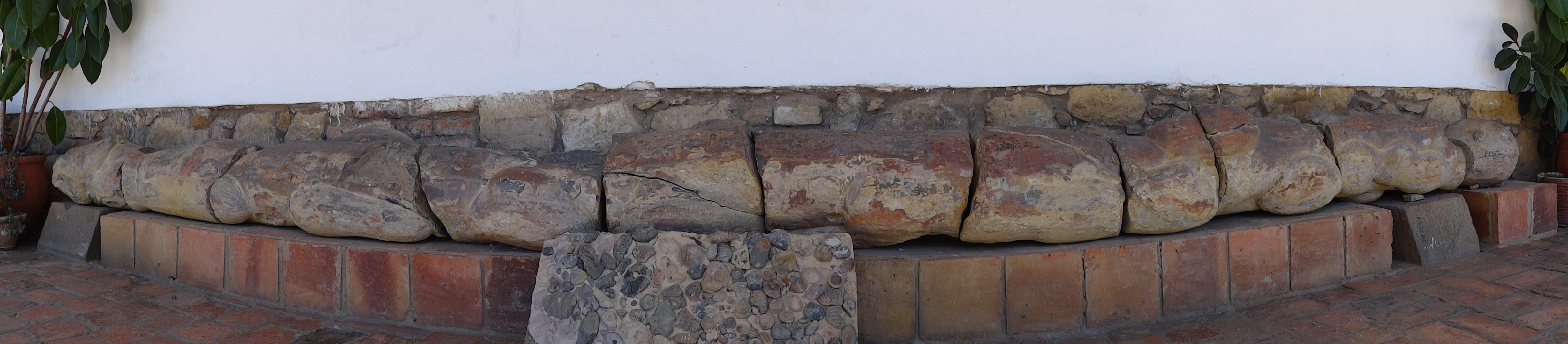 Vista panorámica de un fósil. El piso del convento está lleno de fósiles.